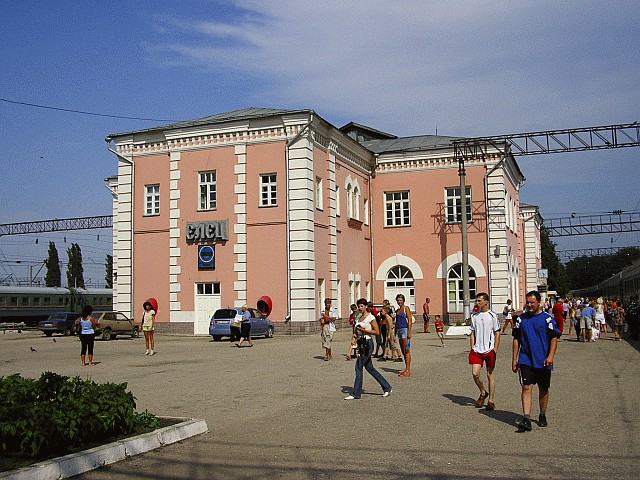 Вокзал